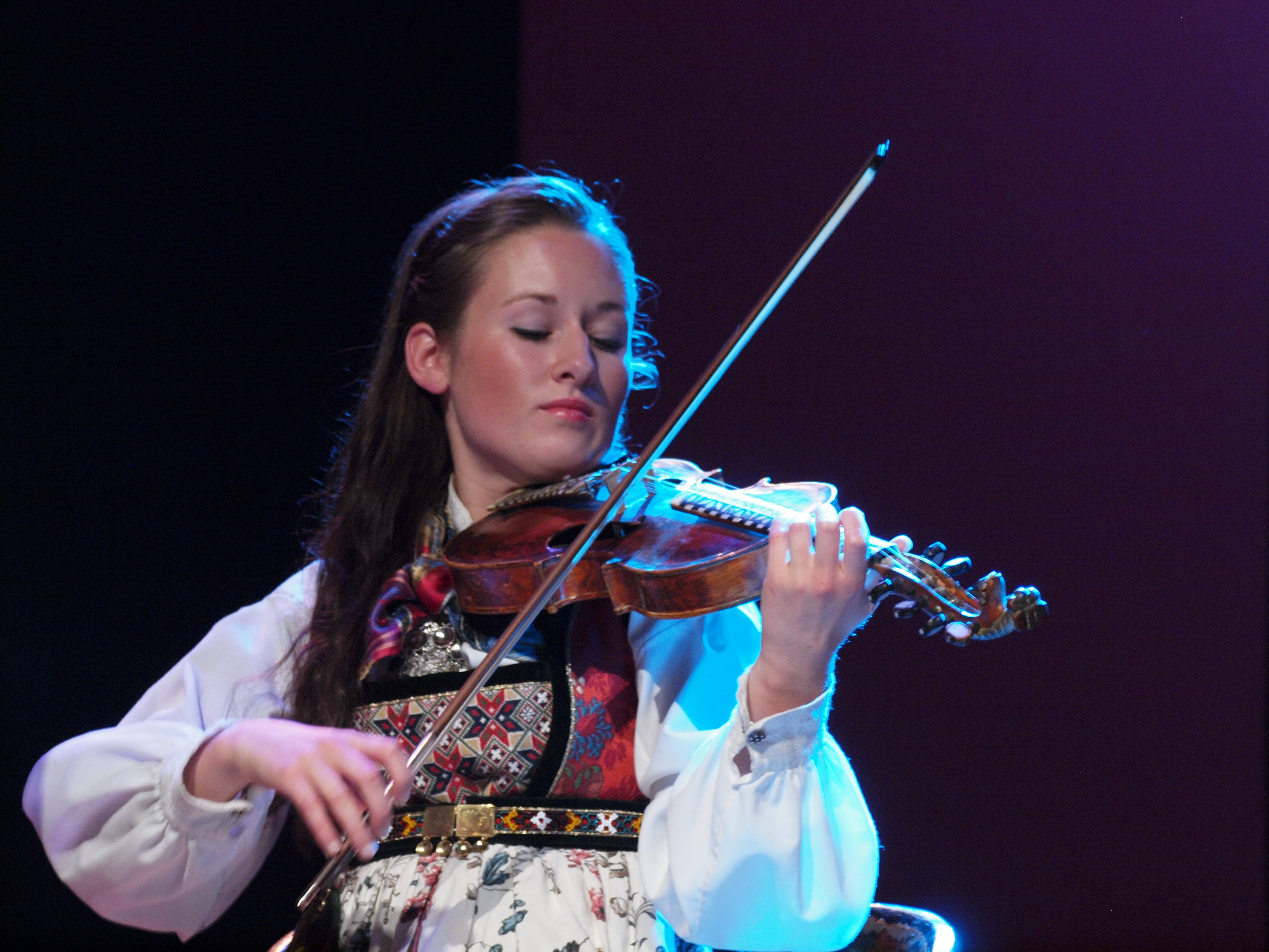 Wikipedia:no:Ragnhild Hemsing på folkemusikkfestivalen i Seljord.